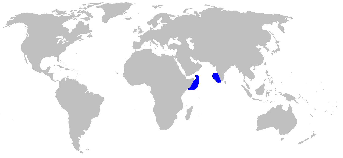 Distribution map for Halaelurus quagga